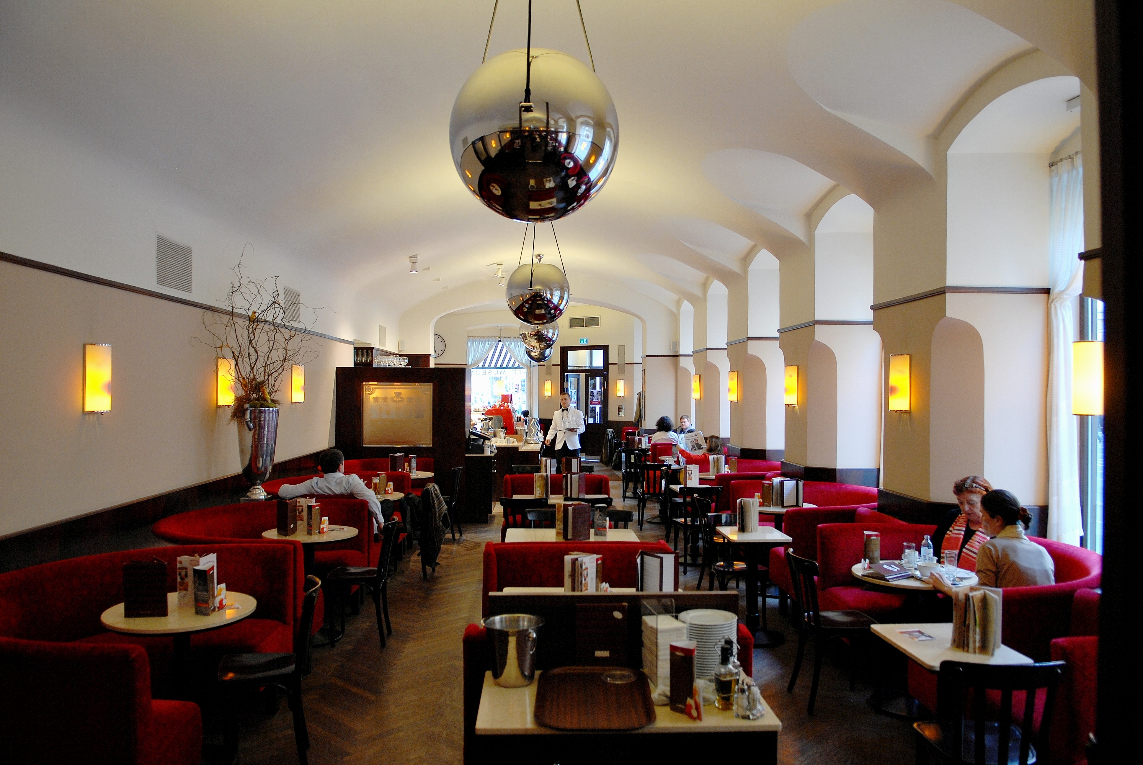 Café Museum, März 2012